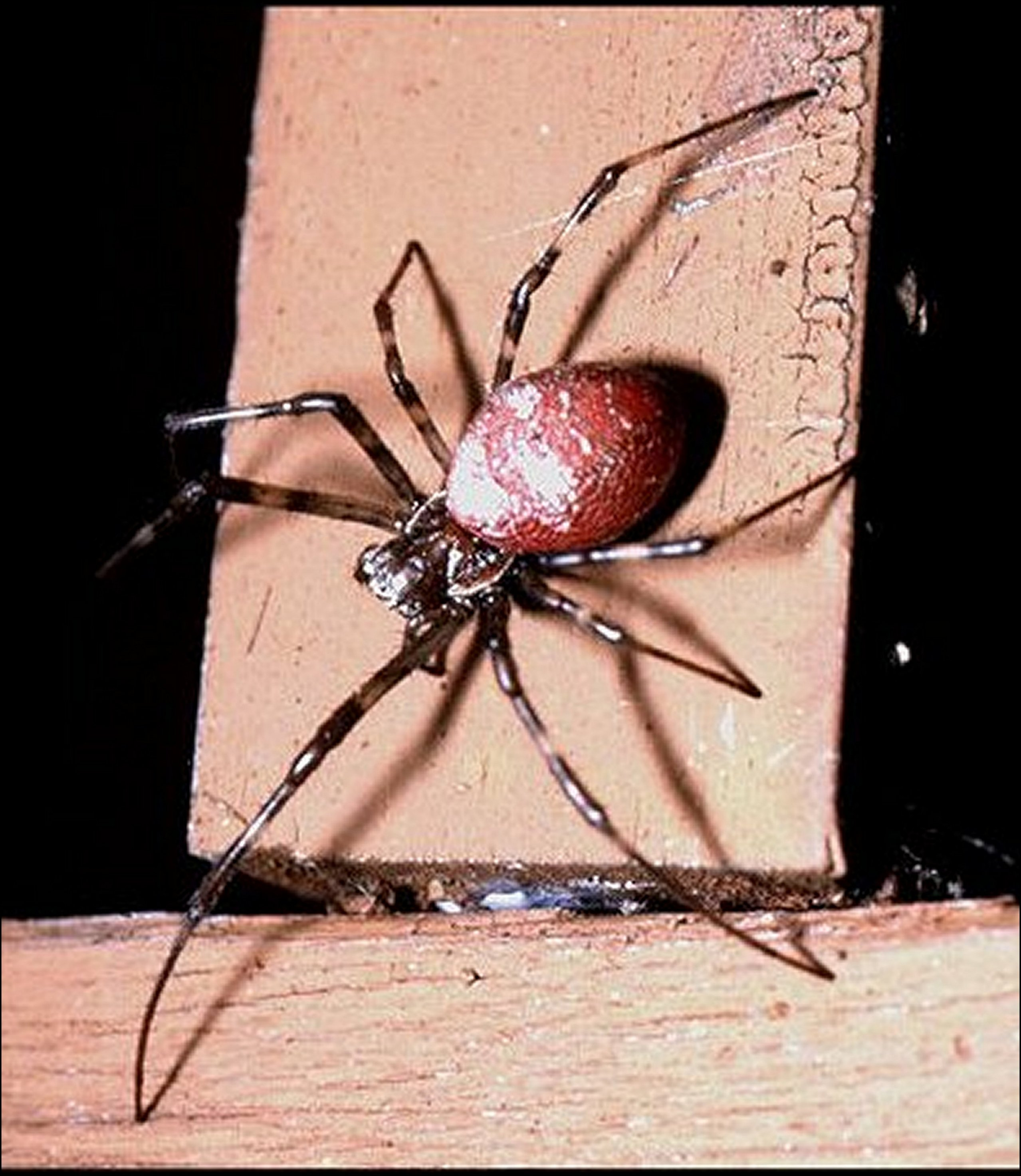 Nephilengis, femelle adulte,vue dorsale. Hangard, Salazie, île de la Réunion.